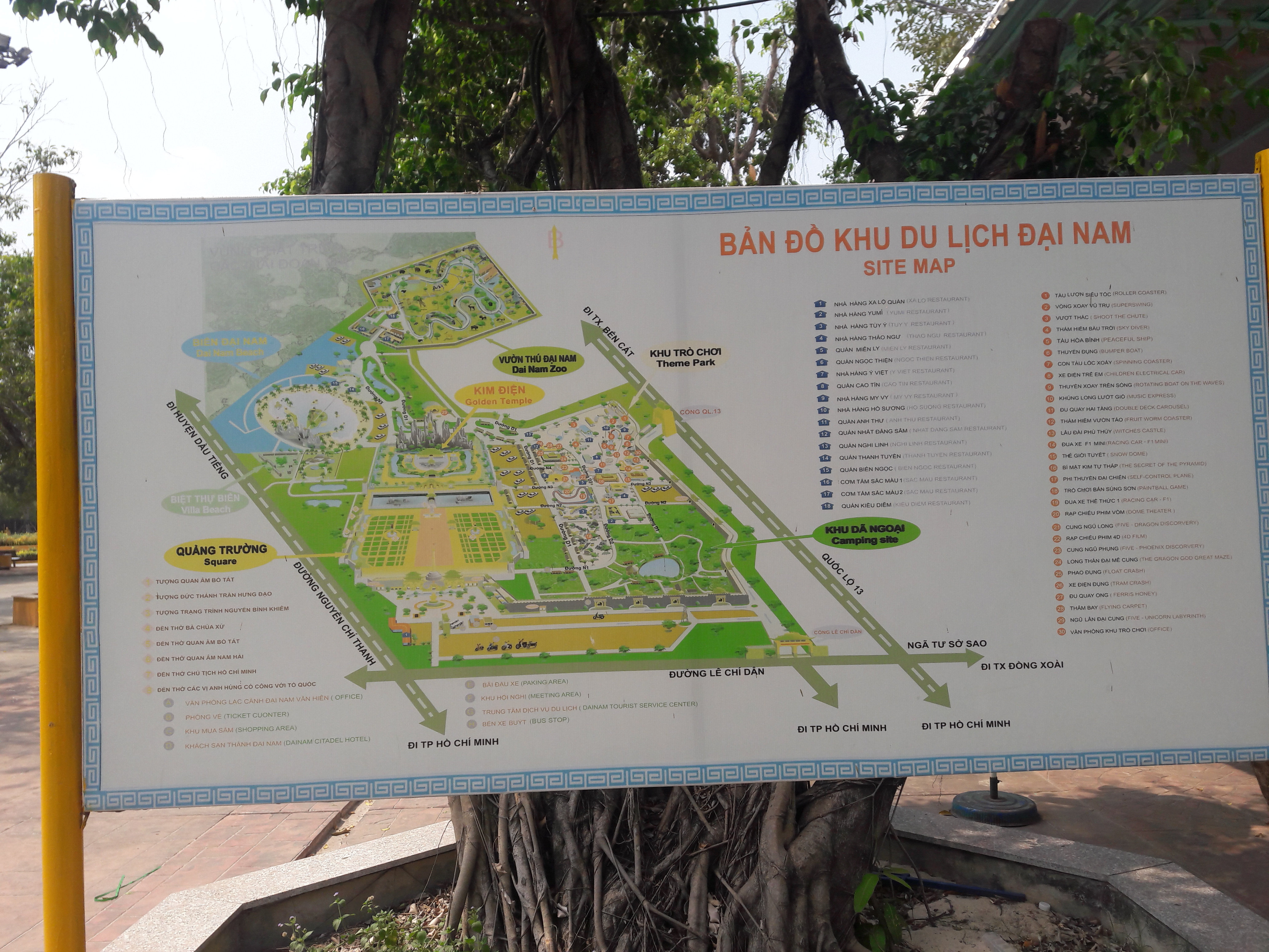 Sơ đồ Lạc cảnh Đại Nam Văn Hiến